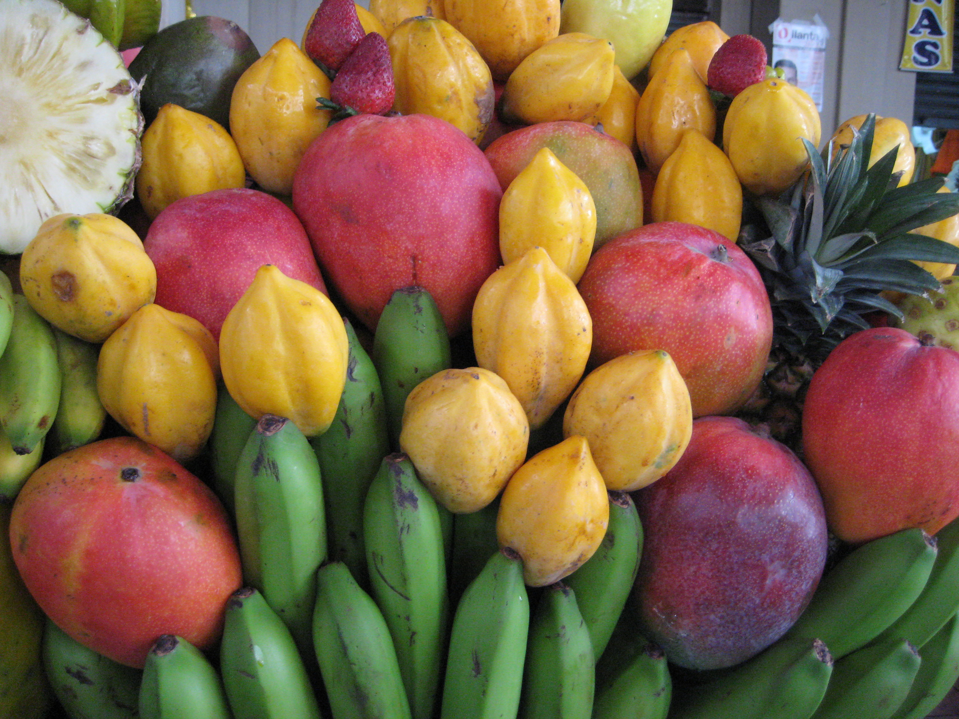 mango, papaya arequipena, banana